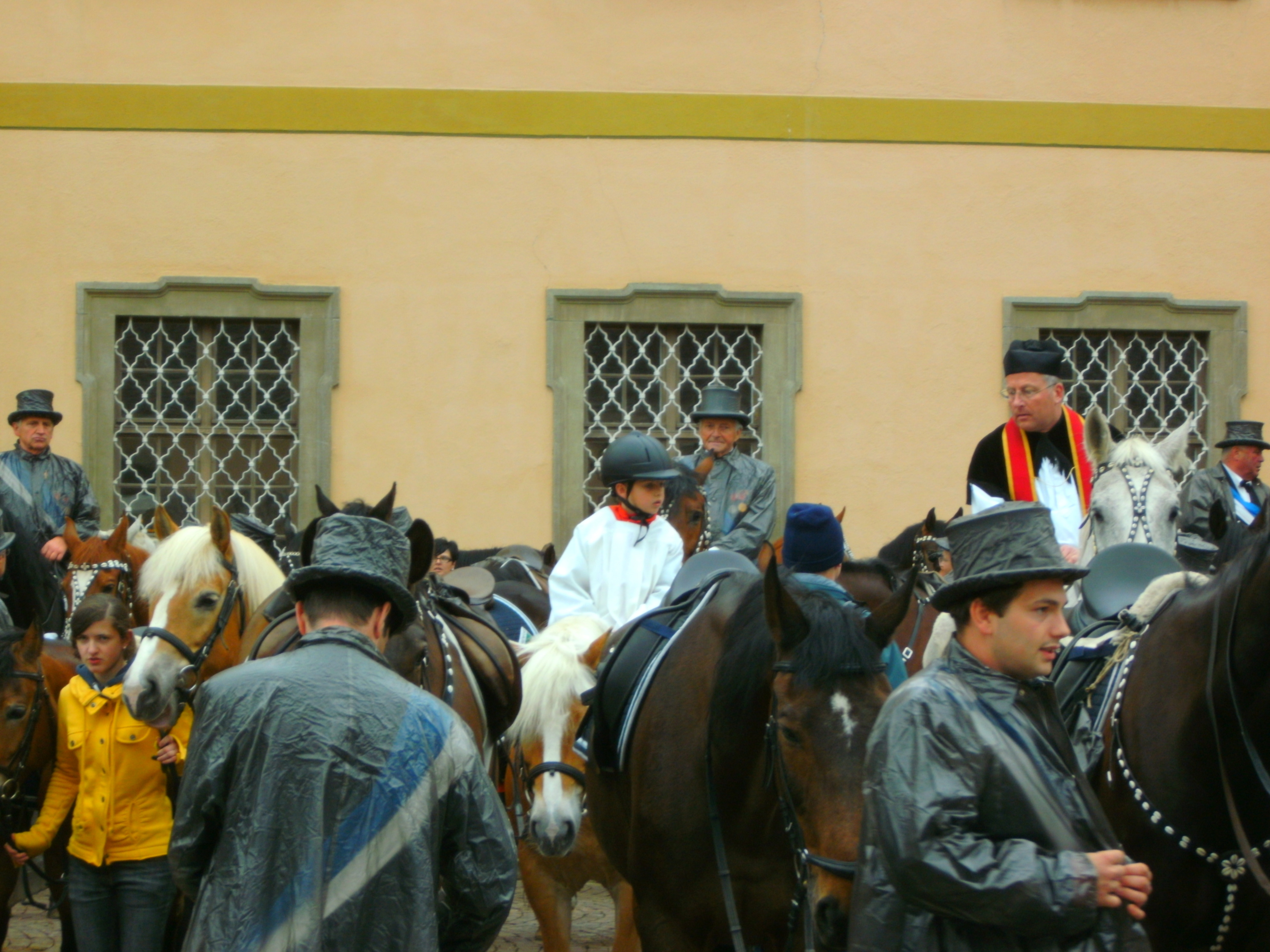 Blutritt Weingarten 2010 - Pfarrer und Ministrant